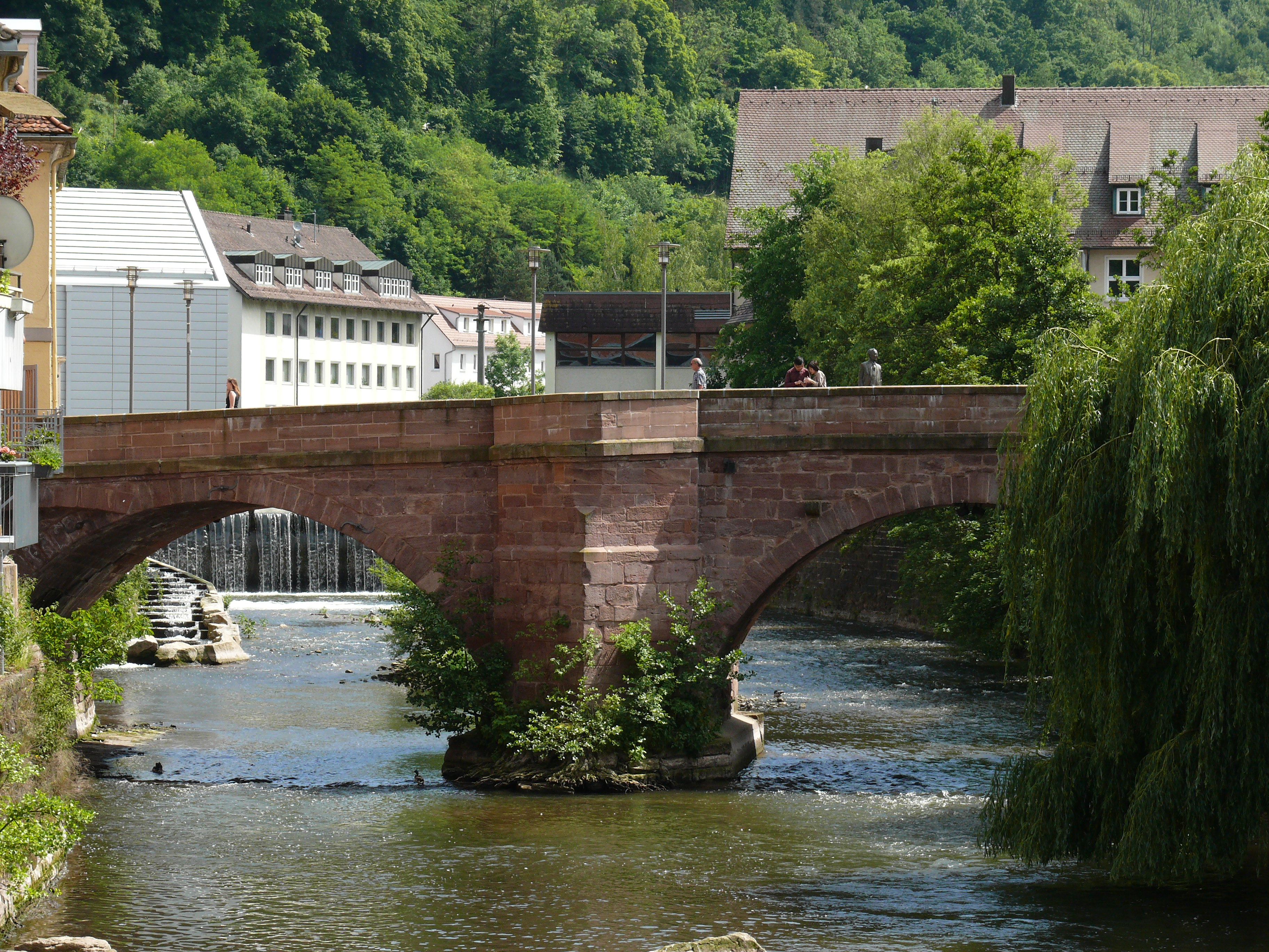 Nikolausbrücke in Calw; Das Hermann-Hesse-Standbild steht rechts.